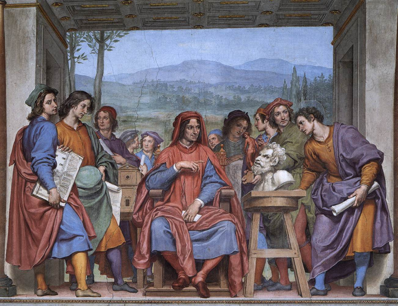 Ottavio Vannini - Michelangelo Showing Lorenzo il Magnifico the affresco Palazzo Pitti - Firenze